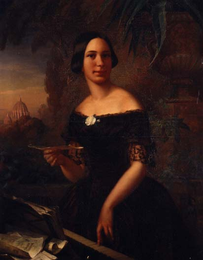 Fanny Hünerwadel, schweizerische Komponistin